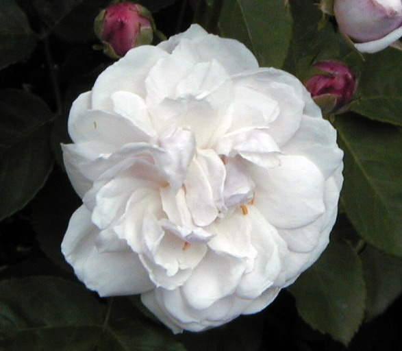 Rosa x noisettiana, gr. Noisettianas, sect. Chinensis. Real Jardín Botánico de Madrid.